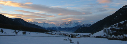 St. Valentin mit Blick nach Süden, im Hintergrund die Ortlergruppe.